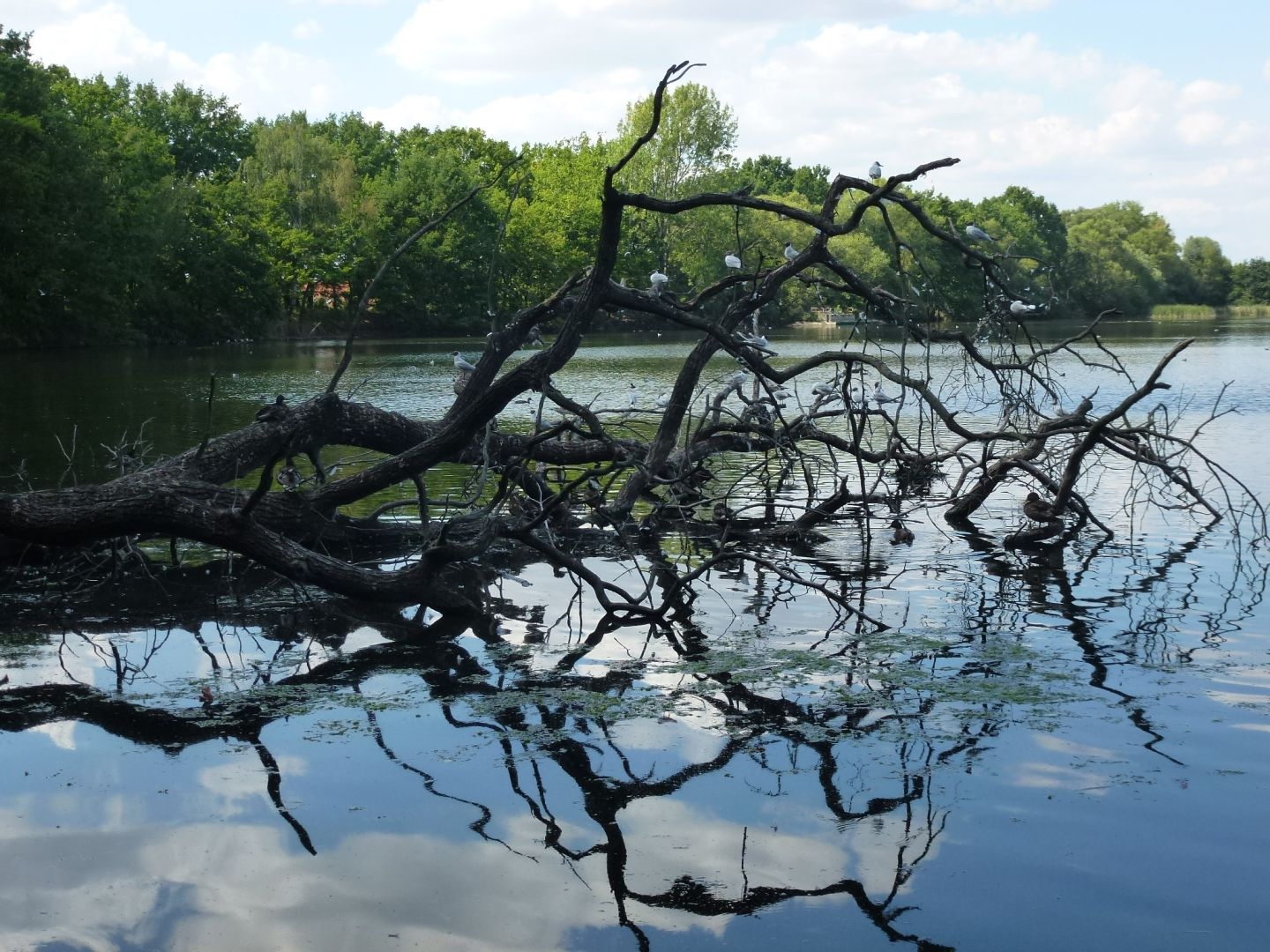 Ententeich in Brandis